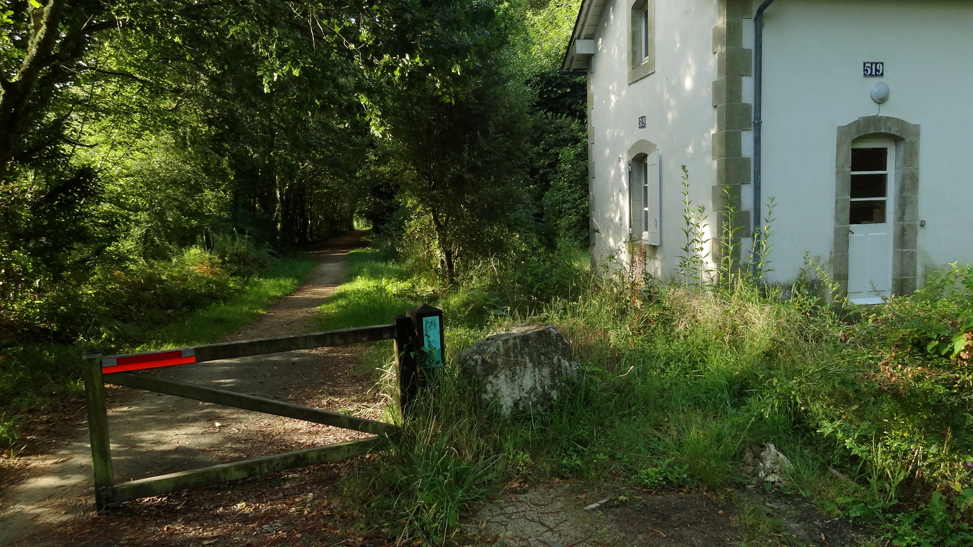 Ancienne maison de garde-barrière (numéro 519) au début de la voie verte de Guengat à Douarnenez, Bretagne, France